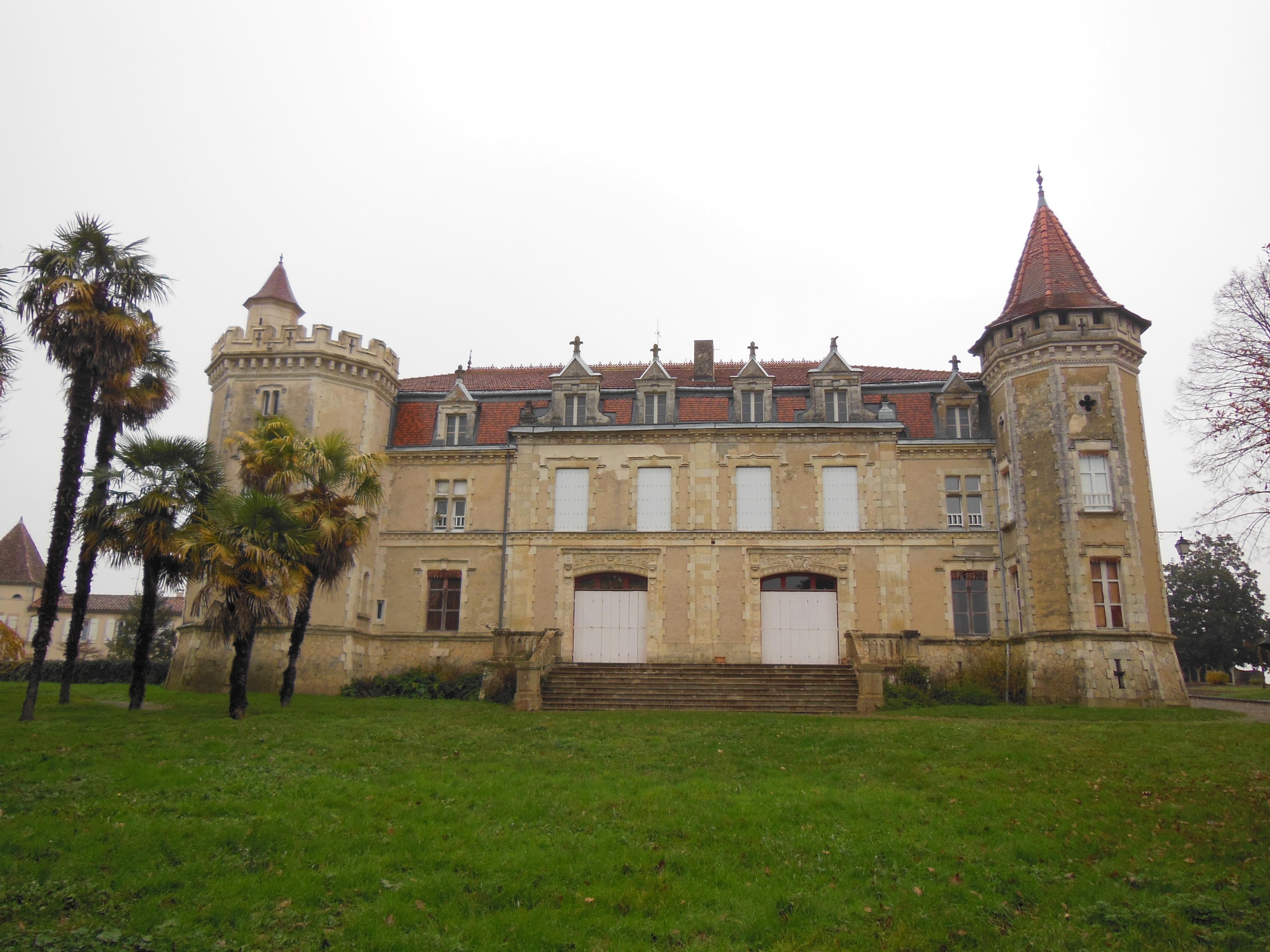 Château de Poudenx, à Saint-Cricq-Chalosse (Landes, France)